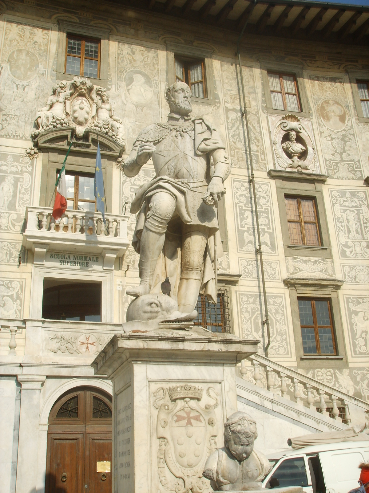 Pietro Francavilla, Monumento (1596) a Cosimo I de' Medici, in divisa da Gran Maestro dell'Ordine di Santo Stefano, l'ordine cavalleresco incaricato di combattere le navi barbaresche ed ottomane, che aveva la sua base a Pisa. La statua si trova in Piazza dei Cavalieri a Pisa, di fronte alla Scuola Normale.